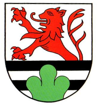 Wappen der Gemeinde Molbergen im Landkreis Cloppenburg